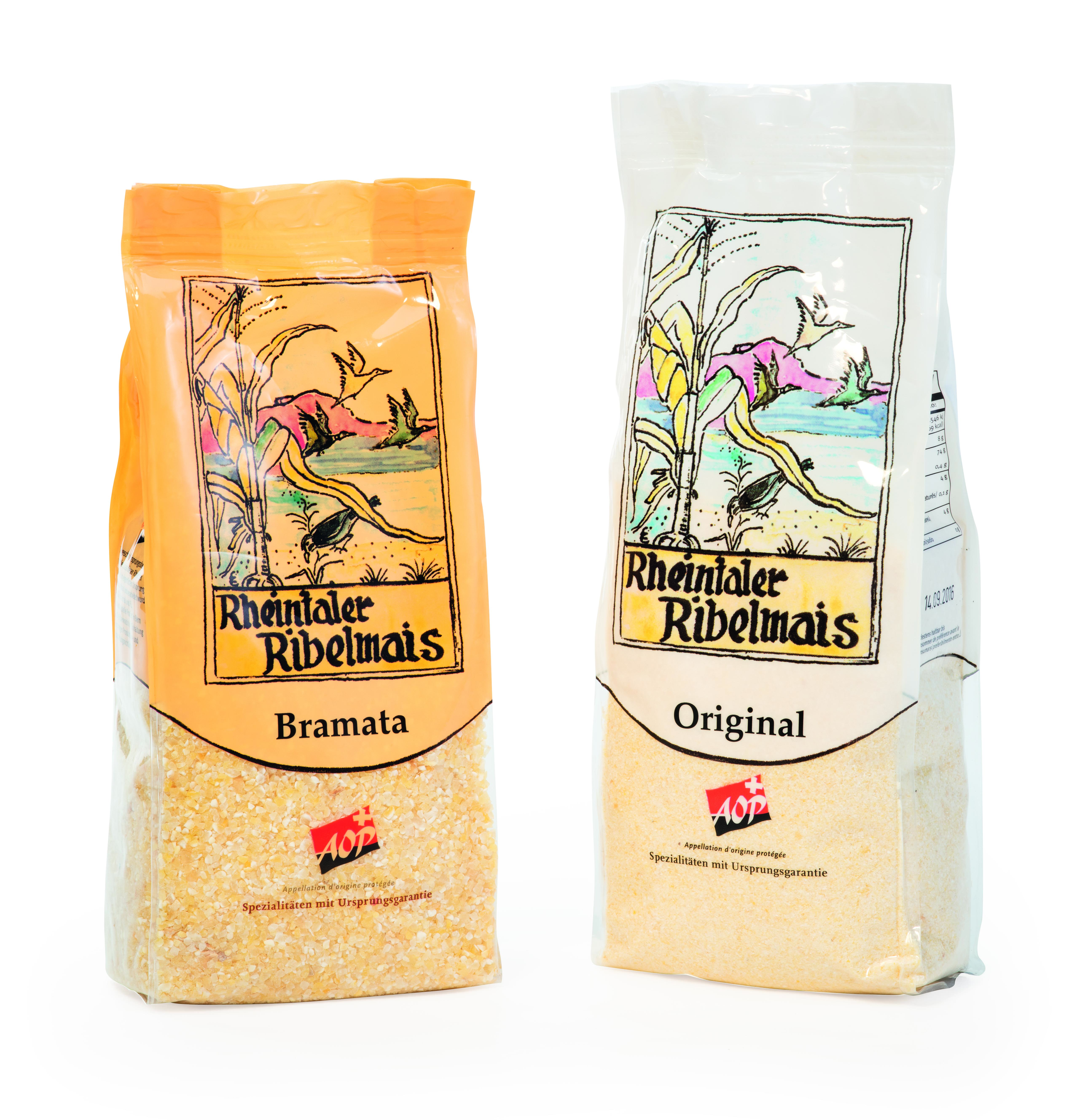 adfg